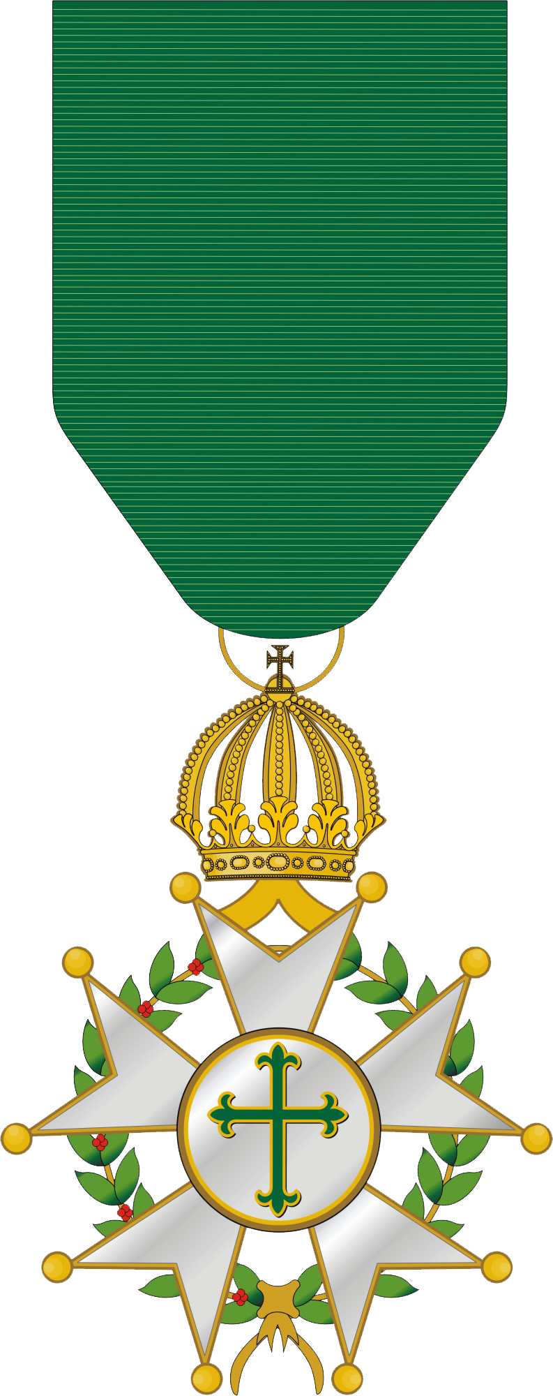 Condecoração da Imperiall Ordem de São Bento Avis - Grau: Oficial.